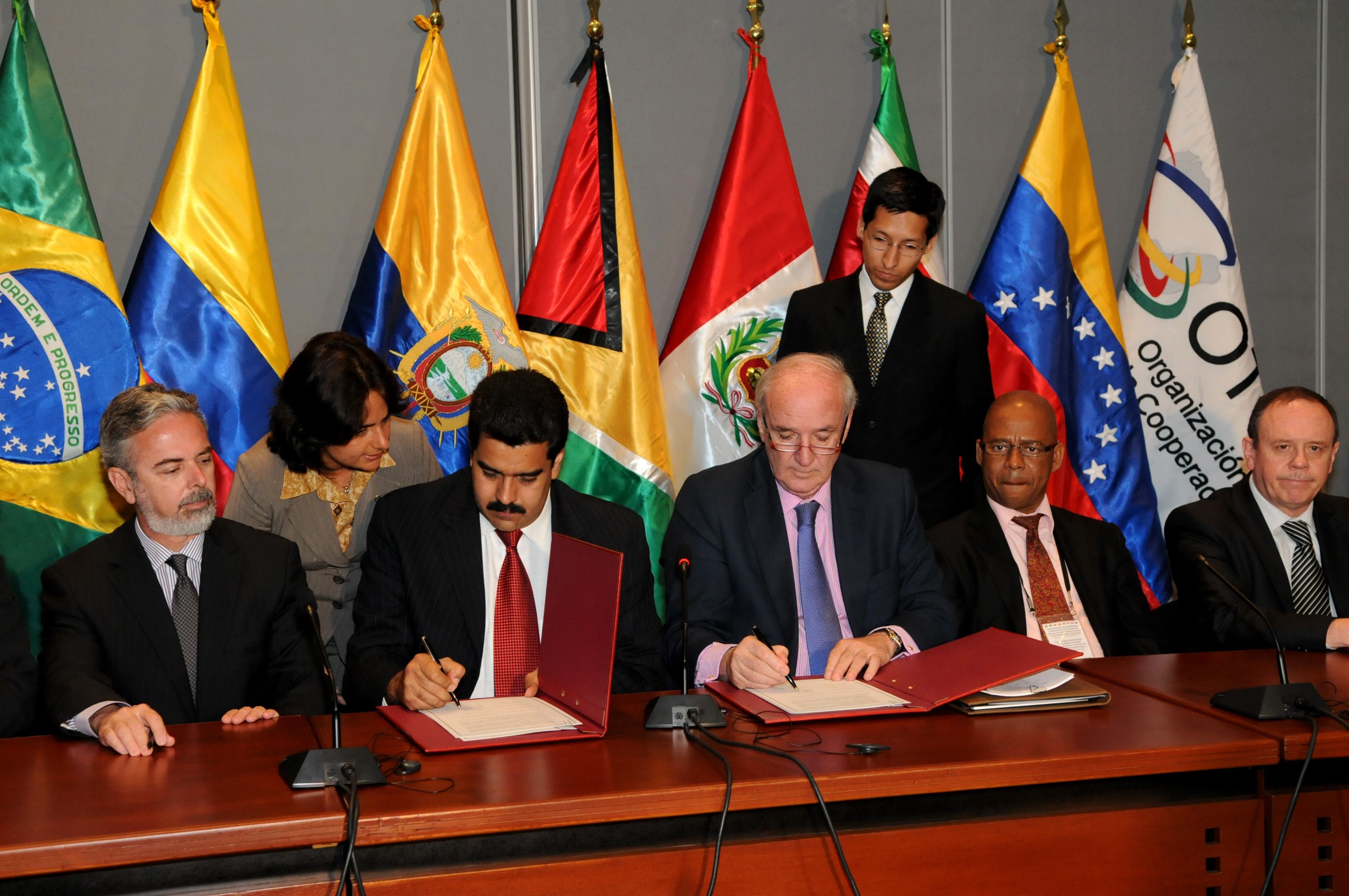 El Canciller peruano, José A. García Belaunde, ofreció con su homólogo de Venezuela, Nicolás Maduro, y representantes de Bolivia, Brasil, Colombia, Ecuador, Guyana y Surinam, una conferencia de prensa en que informó sobre los resultados de la X Reunión de Ministros de Relaciones Exteriores de los Países Miembros de la Organización del Tratado de Cooperación Amazónica realizada en Lima